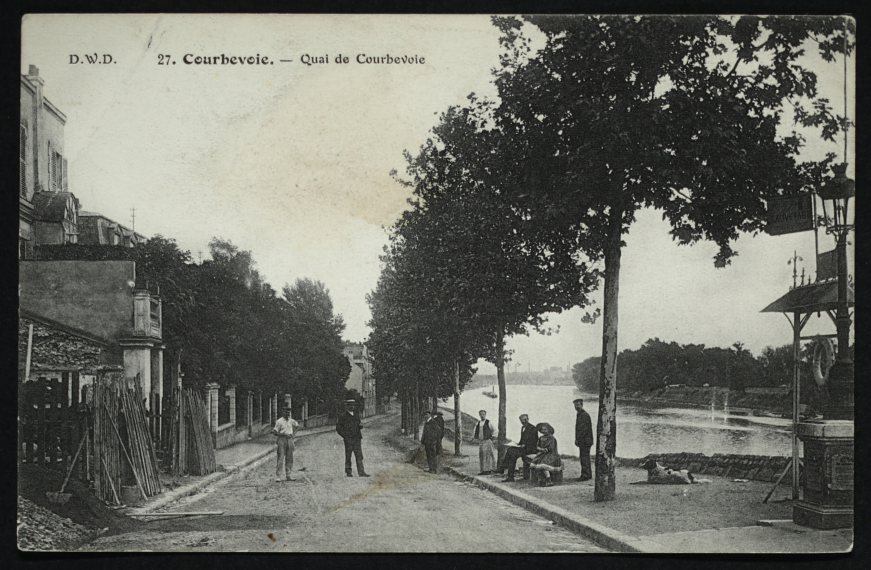 Quai de Courbevoie - 9FI/COU_156